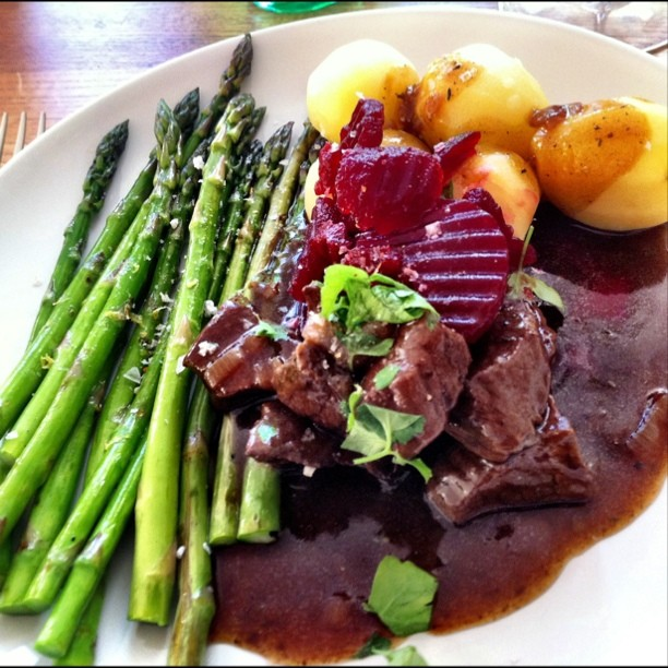 Skånsk kalops med grillad sparris